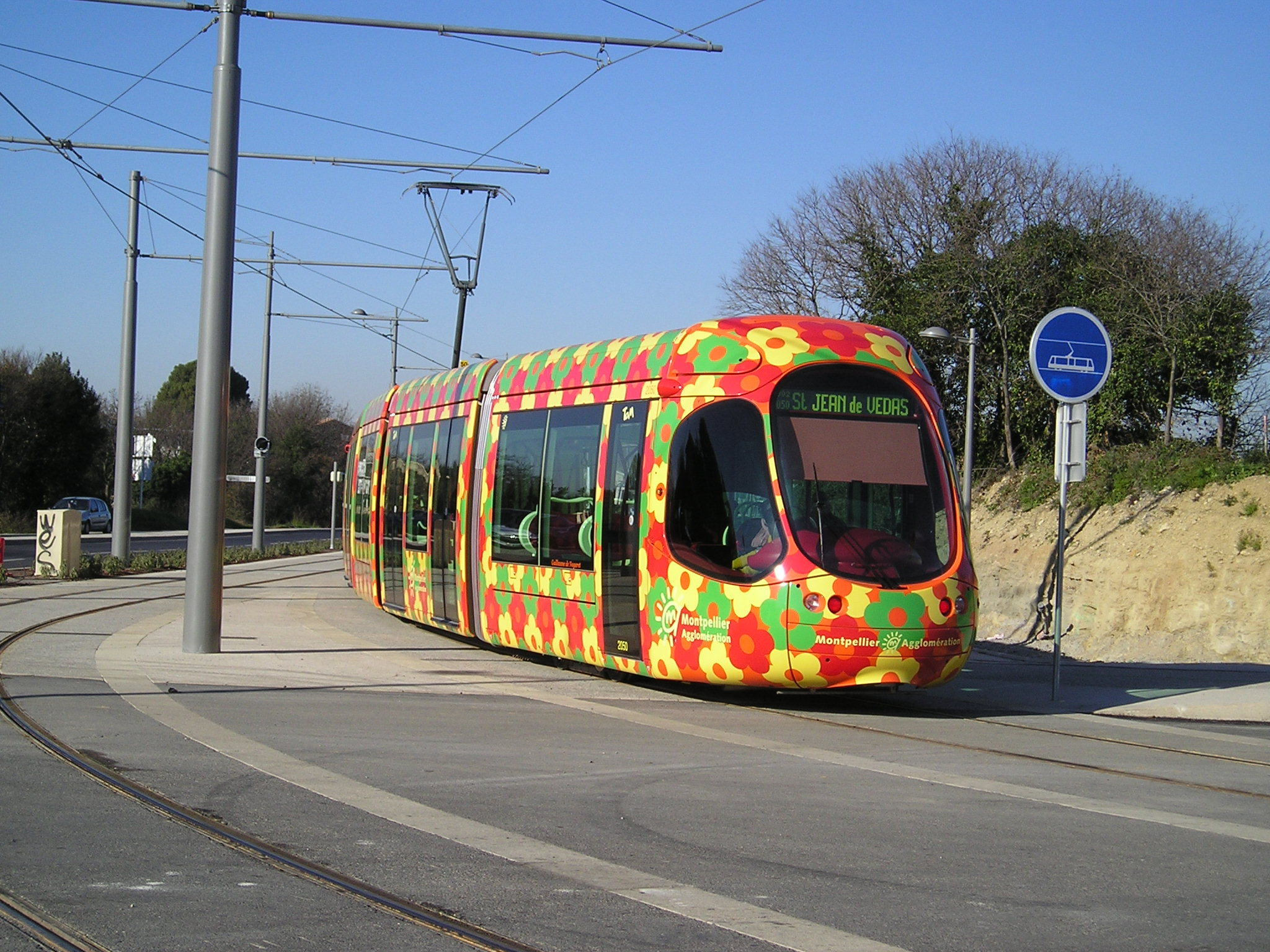 Rame de la ligne 2 du tramway de Montpellier quittant la station Saint-Jean-le-Sec pour se diriger vers la station Saint-Jean-de-Védas Centre.